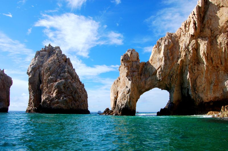 El Arco de Cabo San Lucas, a group of rocks near Cabo San Lucas, Mexico.